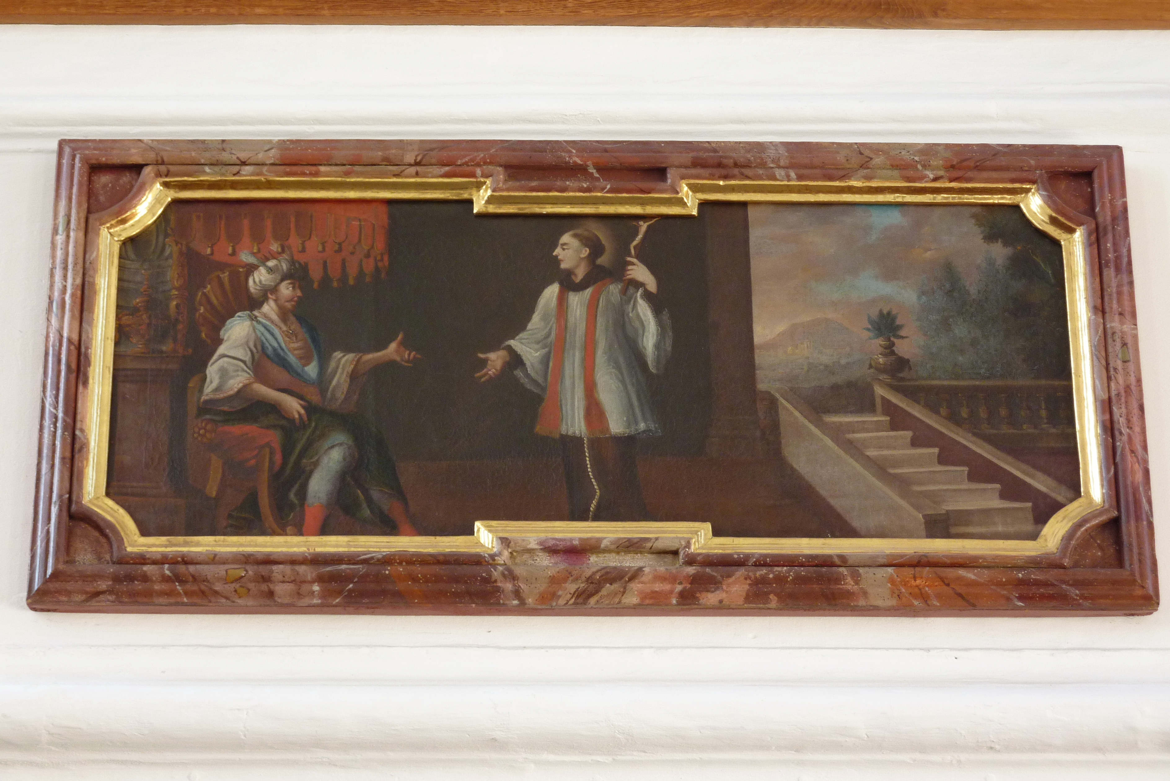 Katholische Pfarrkirche St. Peter in Burghagel, einem Ortsteil der Gemeinde Bachhagel im Landkreis Dillingen an der Donau (Bayern), Gemälde an der Emporenbrüstung, 1. Hälfte des 18. Jahrhunderts; Darstellung: Franz Xaver spricht mit einem orientalischen Fürsten